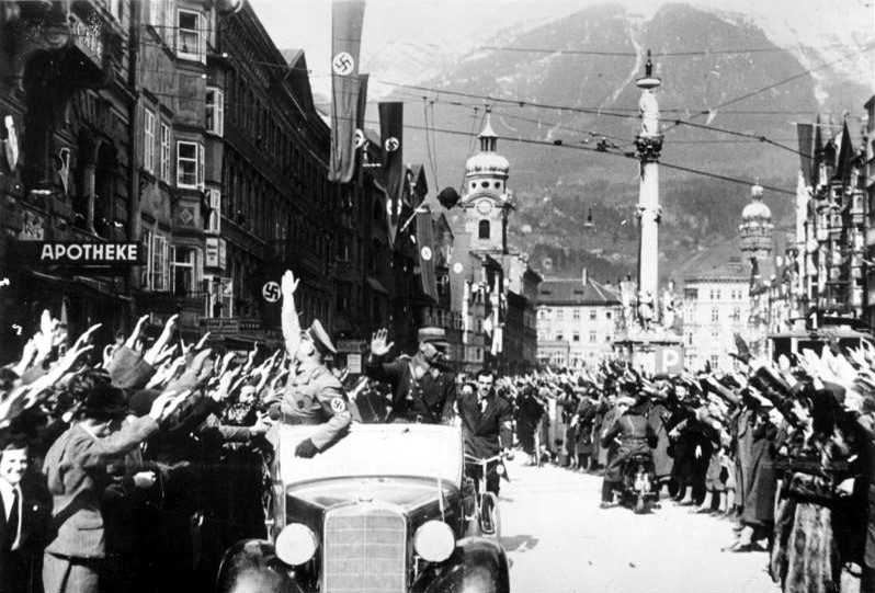 This description has been identified as biased or incorrect: Original Nazi-propaganda descriptionAuch Innsbruck atmete nach fünfjähriger Unterdrückung befreit auf. Im Laufe des Sonnabenvormittags wurde in Innsbruck bekannt, dass die deutschen Soldaten einmarschieren würden. Im Nu waren die Strassen mit begeisterten Menschenmassen angefüllt, um den Tag der Freiheit und Freude zu feiern. UBz die freudig erregte Menschenmenge in der Maria-Theresiastrasse in Innsbruck. 13.3.1938 [Herausgabedatum] Scherl Bilderdienst, Berlin